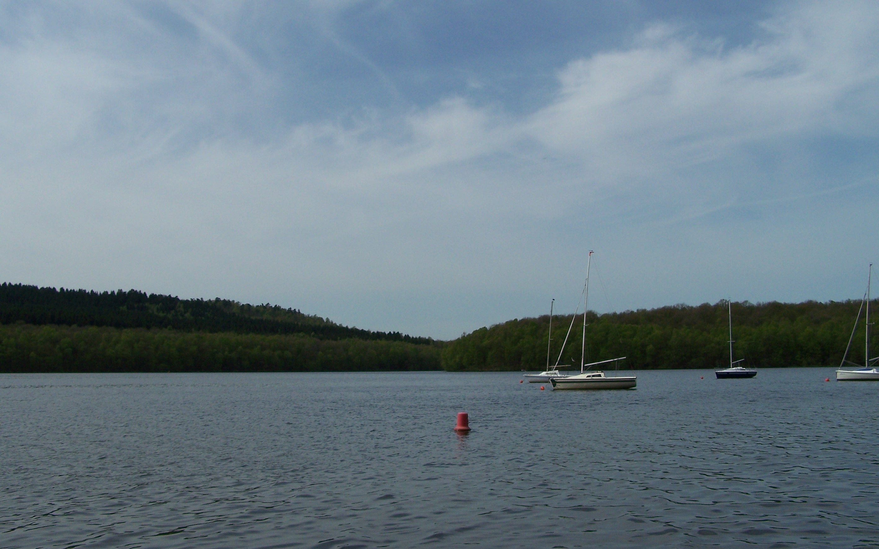 Vue de la baie d'harcy, lac des vieilles forges